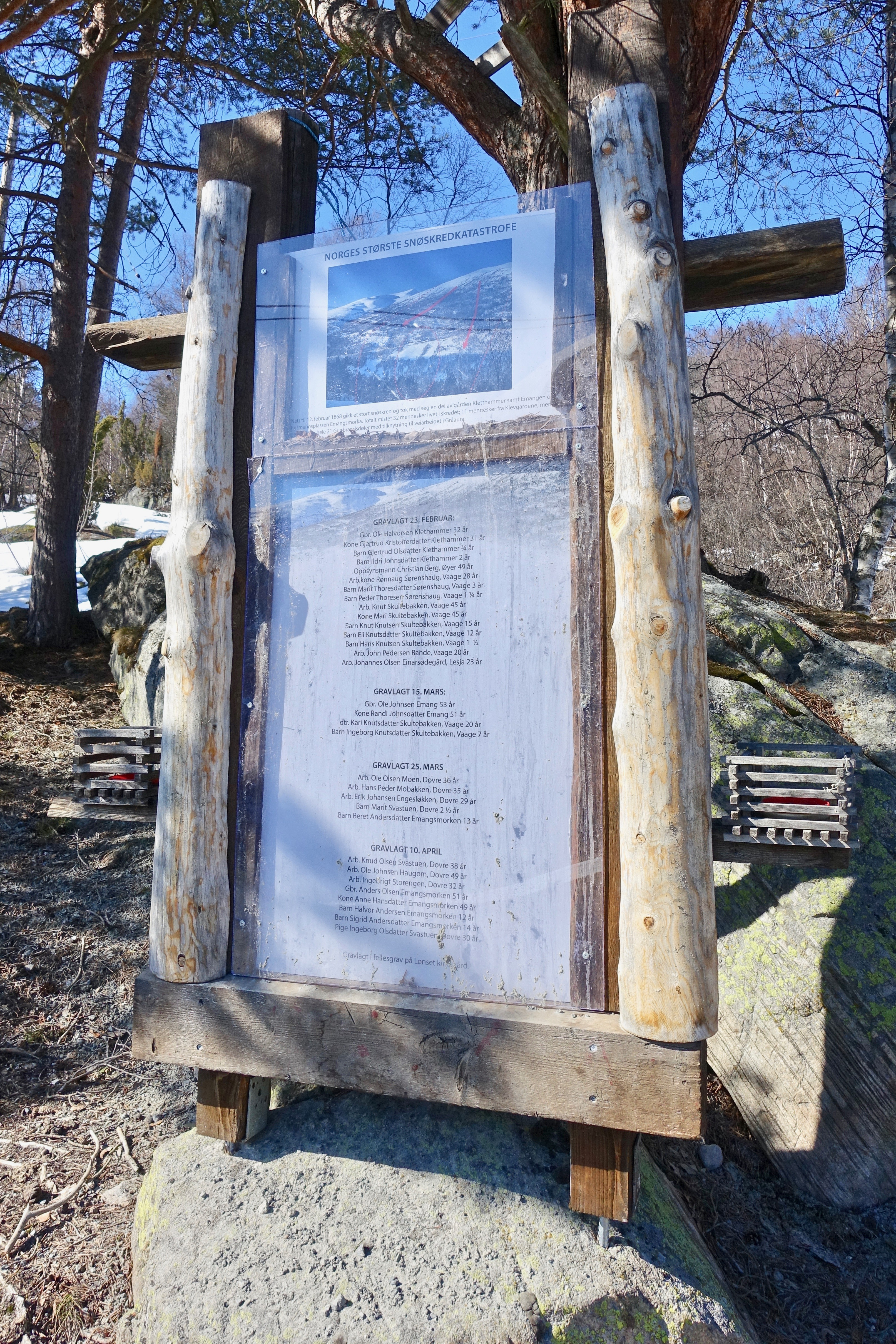 Minnetavle over de 32 omkomne i Kletthamranskredet i 1868 da et snøskred tok de brattlendte Klevgårdene Nedre Kletthammer og Emangen. Ved Klevgardsvegen opp fra riksvei 70 (Sunndalsvegen) like vest for Lønset i Oppdal i Trøndelag fylke. Foto 2019-04-11